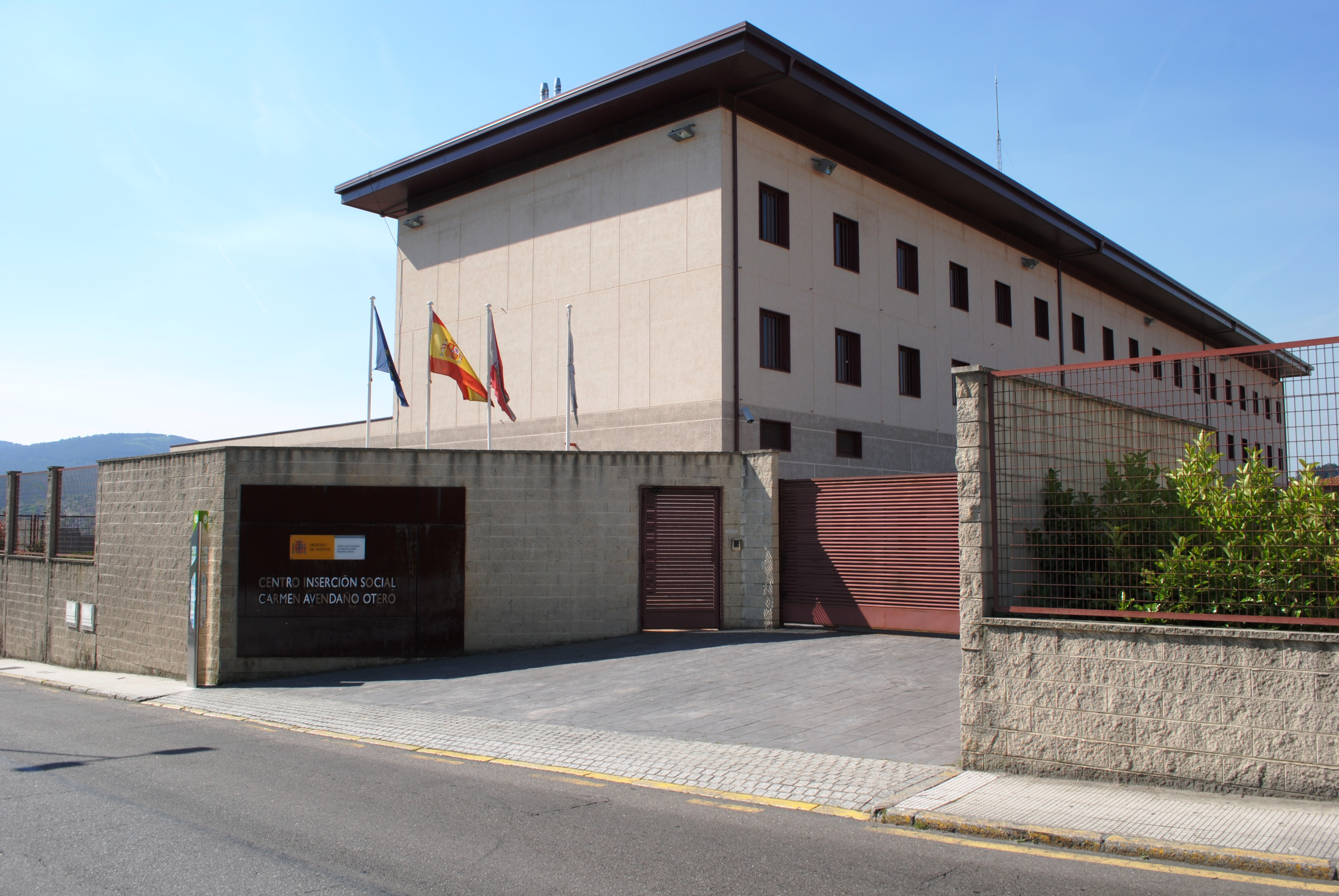 Centro de Inserción Social Carmen Avendaño Otero (Dirección General de Instituciones Penitenciarias), Vigo.